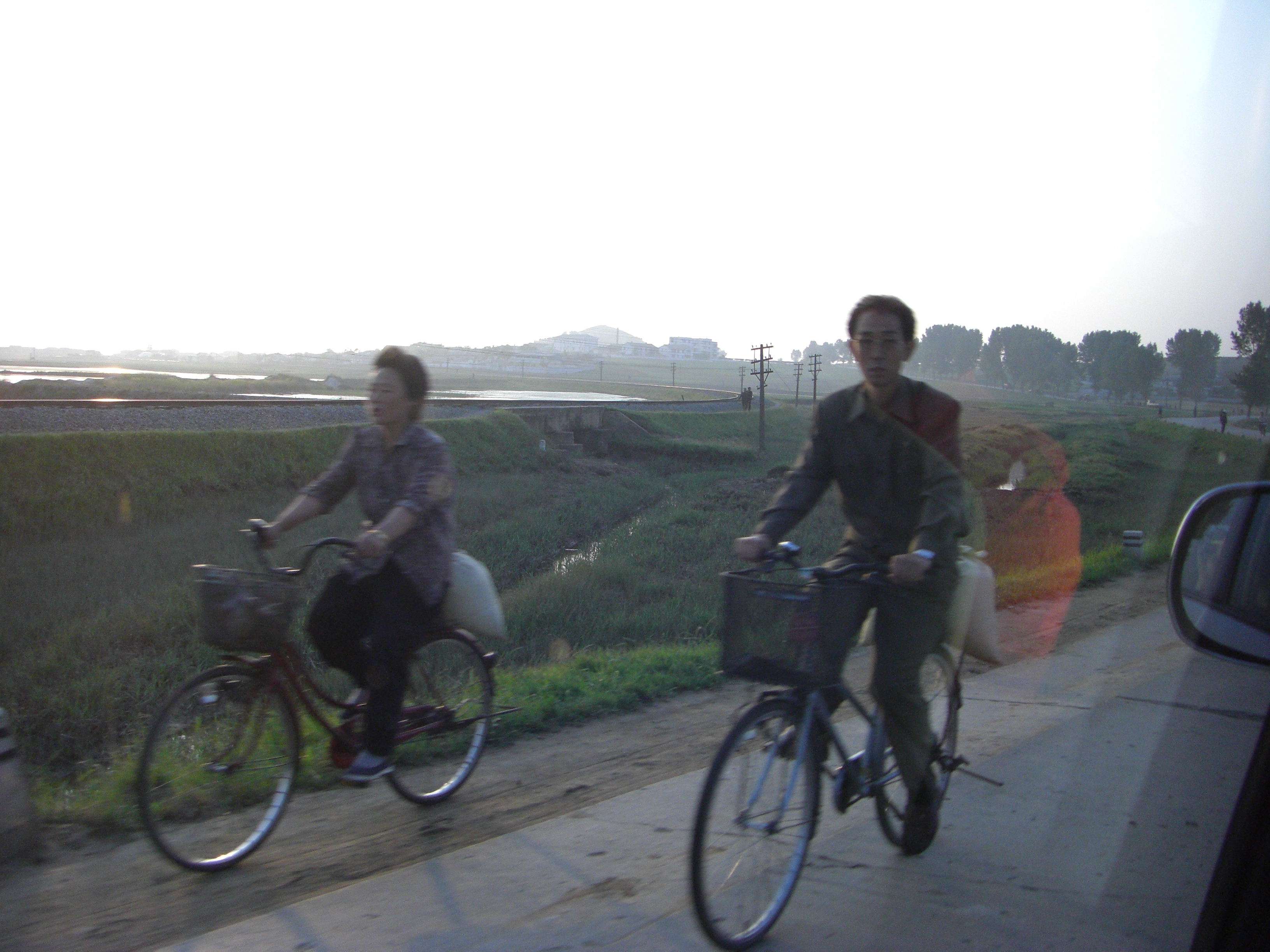 Ryonggang-gun, North Korea.